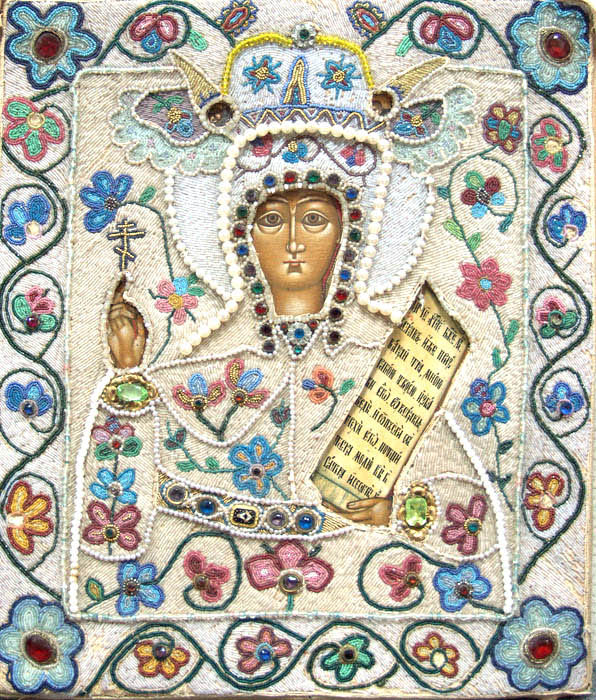 Икона в окладе "Св. Параскева Пятница". Дерево, левкас, сусальное золото, темпера. Оклад - бисер, стразы. 36Х30. Урал, около 1800 г.